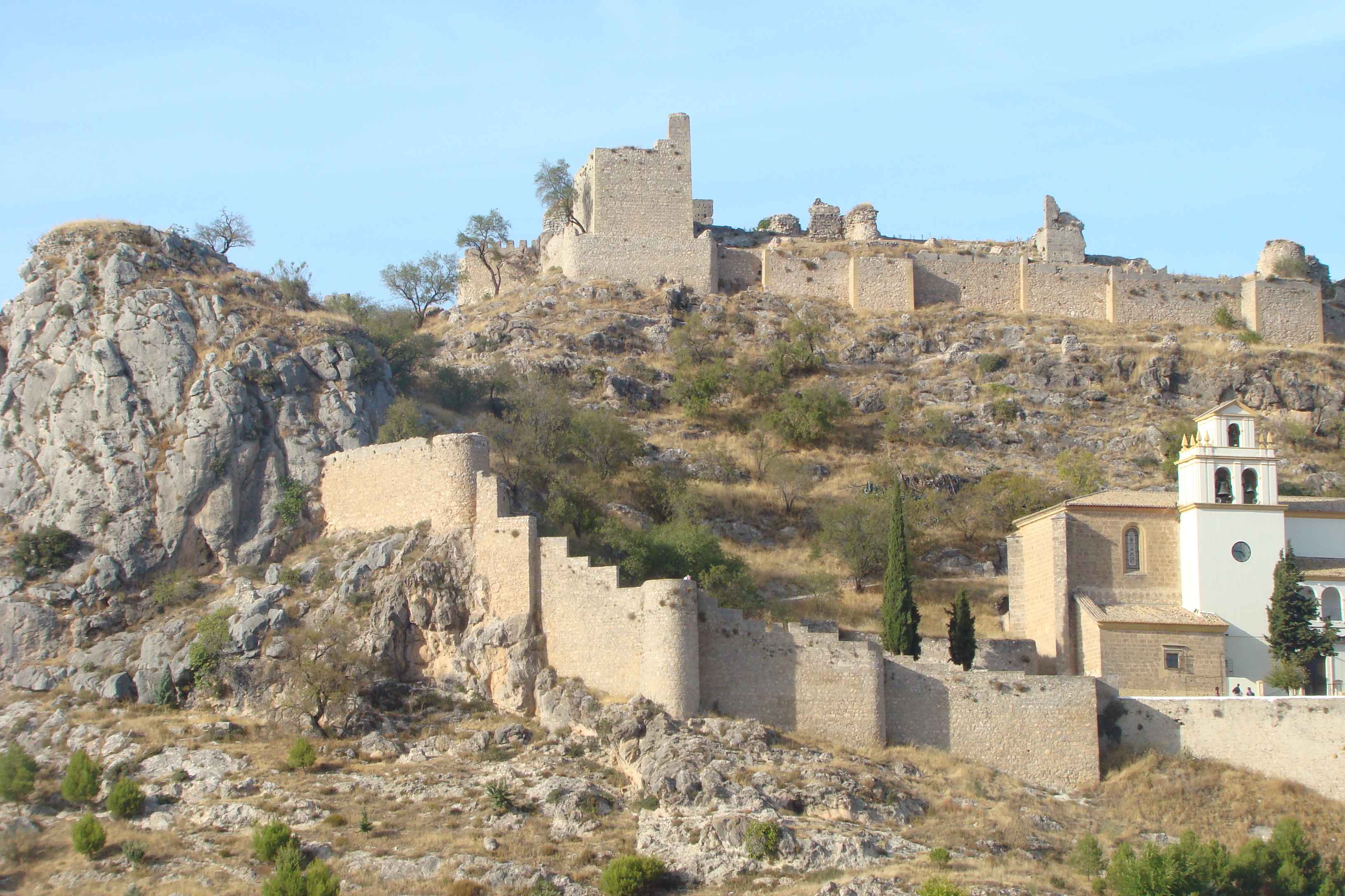 Vista general del Castillo de Moclín y de la Iglesia del Cristo del Paño